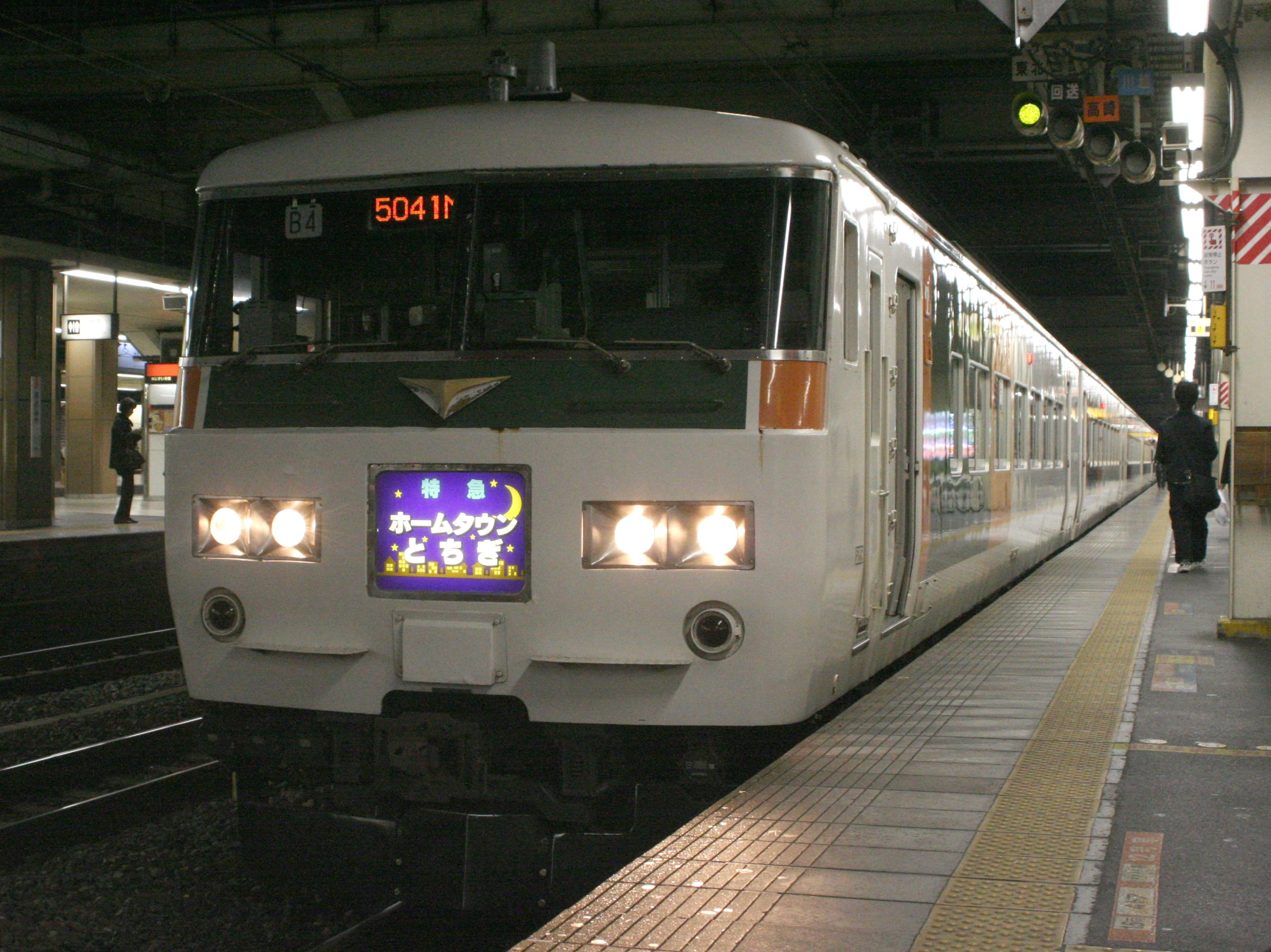 国鉄185系「ホームタウンとちぎ」大宮駅で撮影